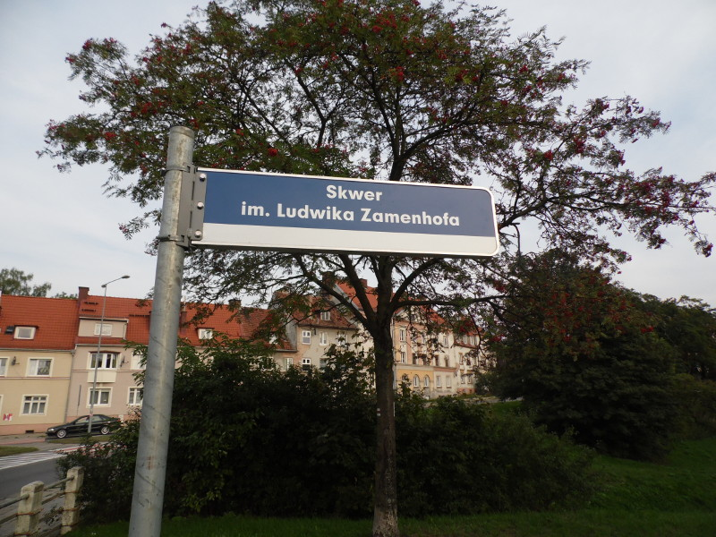 Skwer im. Ludwika Zamenhofa in Elblag